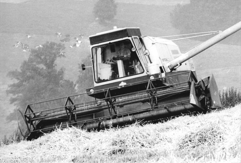 LPG Reinhardtsdorf, Getreideernte ADN-ZB Hiekel 5.8.84 Bez. Dresden: Ernte. Oftmals extreme Hanglagen haben die Mähdrescherfahrer auf den Feldern in der Sächsischen Schweiz zu meistern. Erfahrung hat darin das Jugendkollektiv der LPG Osterzgebirge Börnersdorf, das mit sechs Kombines sozialistische Hilfe in der LPG Oberes Elbtal Reinhardtsdorf leistet.